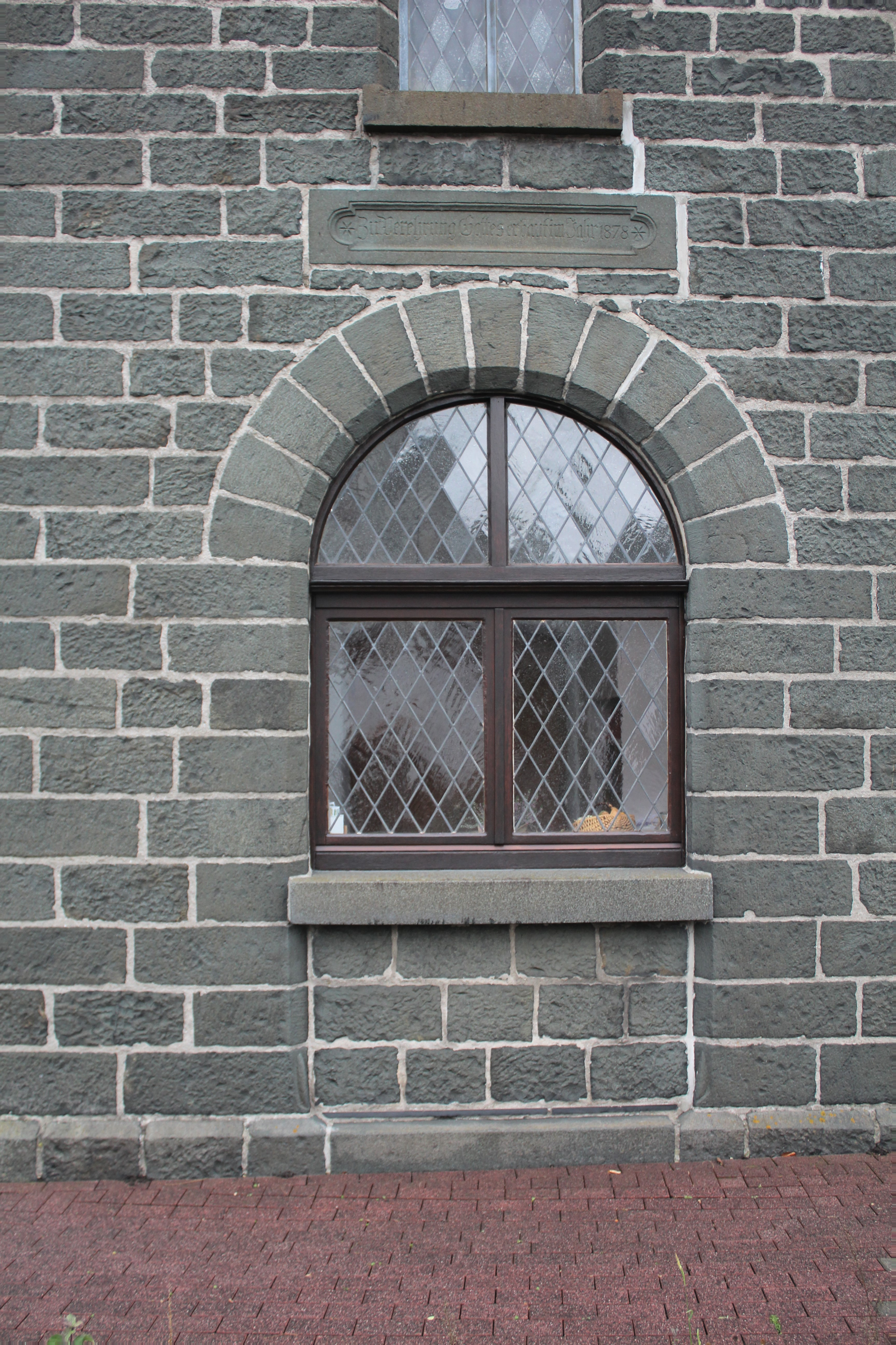 Evangelische Kirche Oberdieten, Breidenbach, Landkreis Marburg-Biedenkopf, Hessen, Deutschland